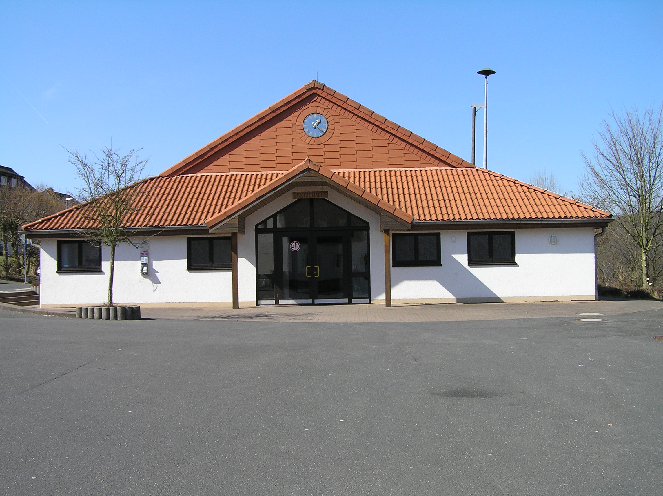 Emsbachtalhalle in Wüstems, Gemeinde Waldems